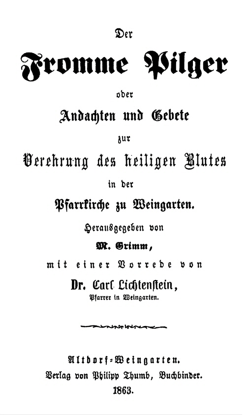 Titelblatt von: Michael Grimm, Der Fromme Pilger